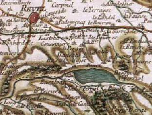 France, Revel (31), Carte de Cassini avec Revel et le lac de Saint-Ferréol